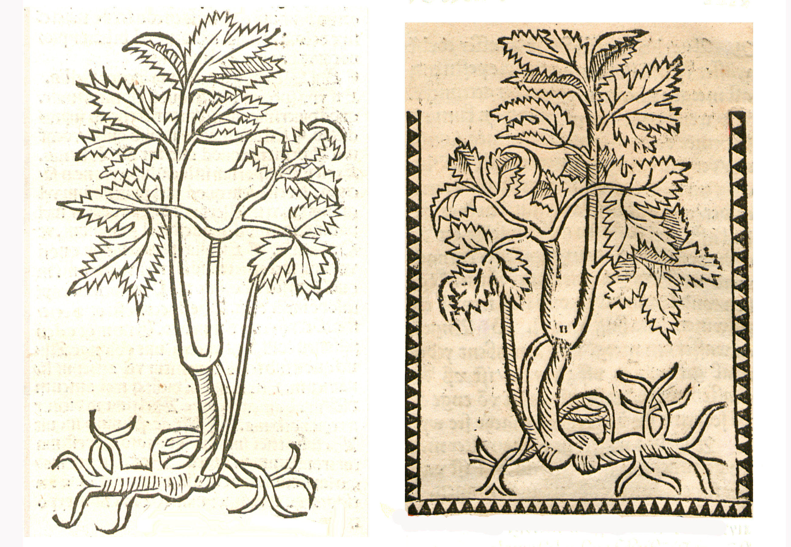 Abbildung von Angelica (Angelica archangelica)